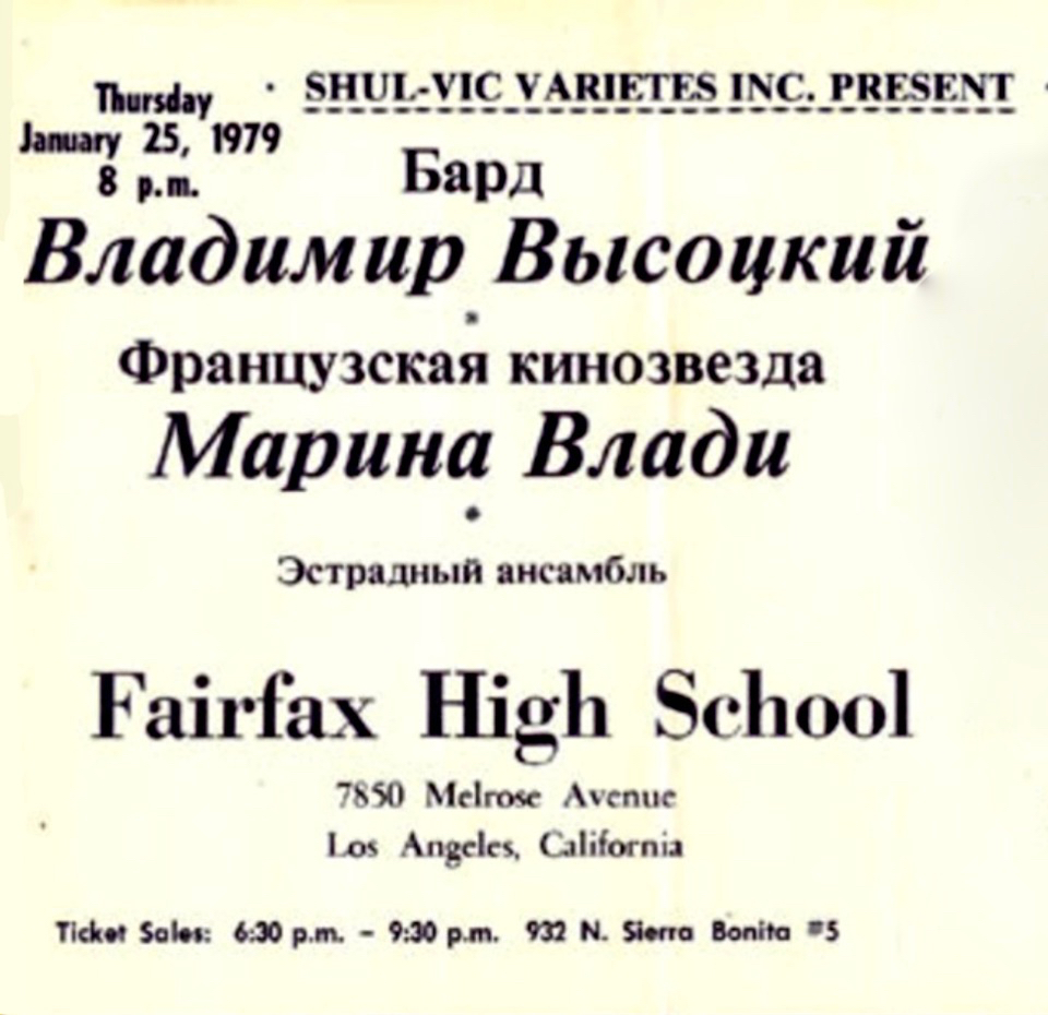 Часть афиши (фото удалено) выступления Владимира Высоцкого и Марины Влади в Америке в 1979 году